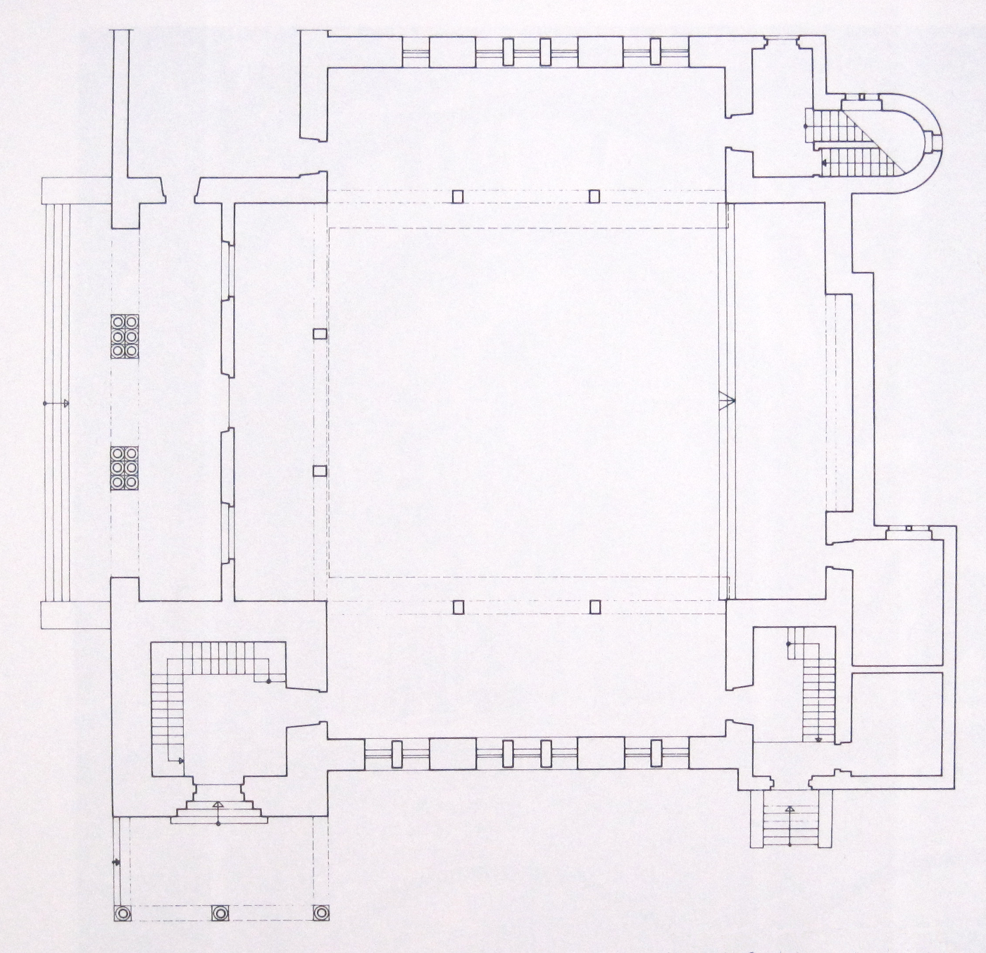 Johanniskirche in Mannheim-Lindenhof